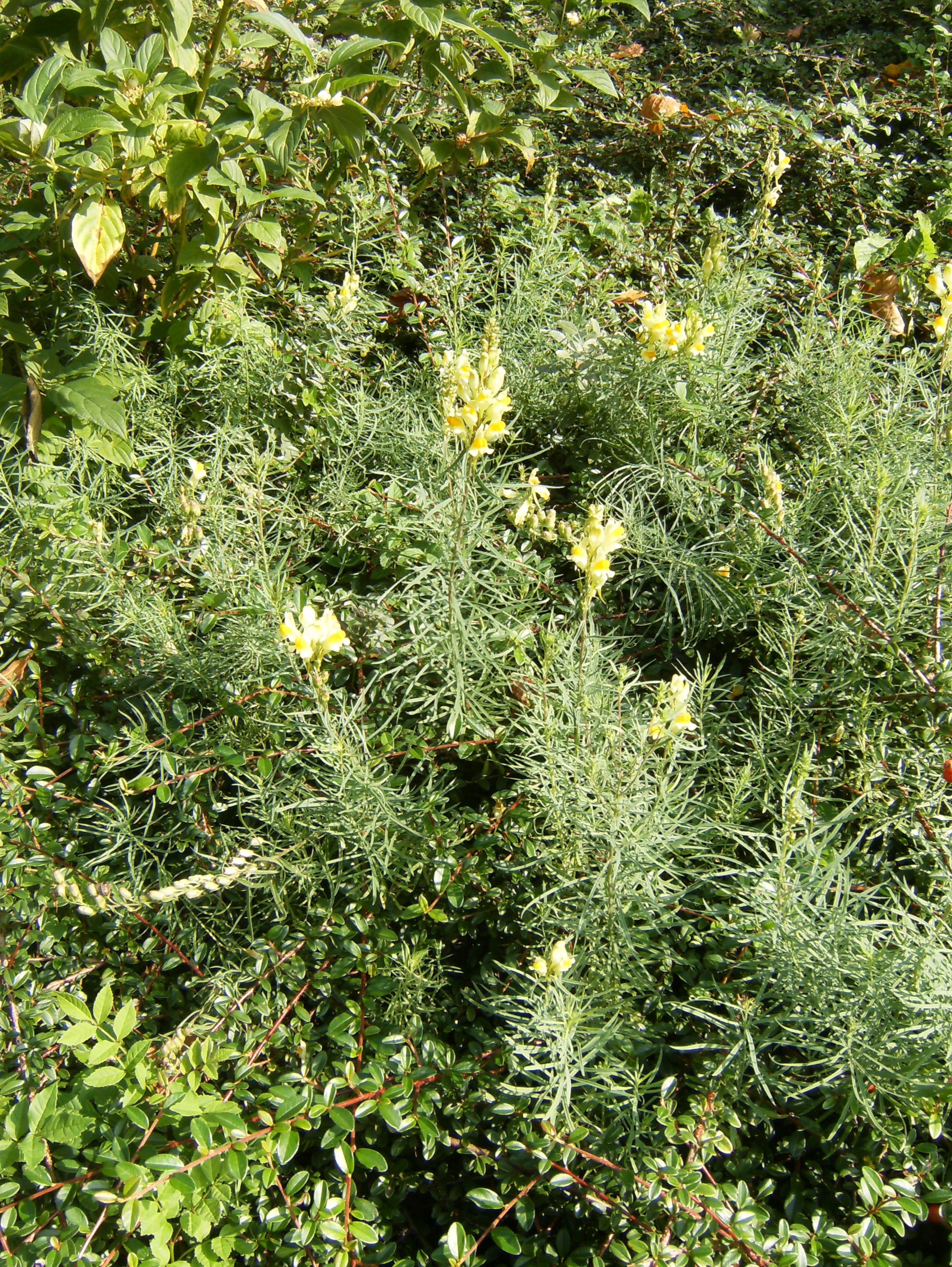 Linaria vulgaris, Zug ZG, Schweiz